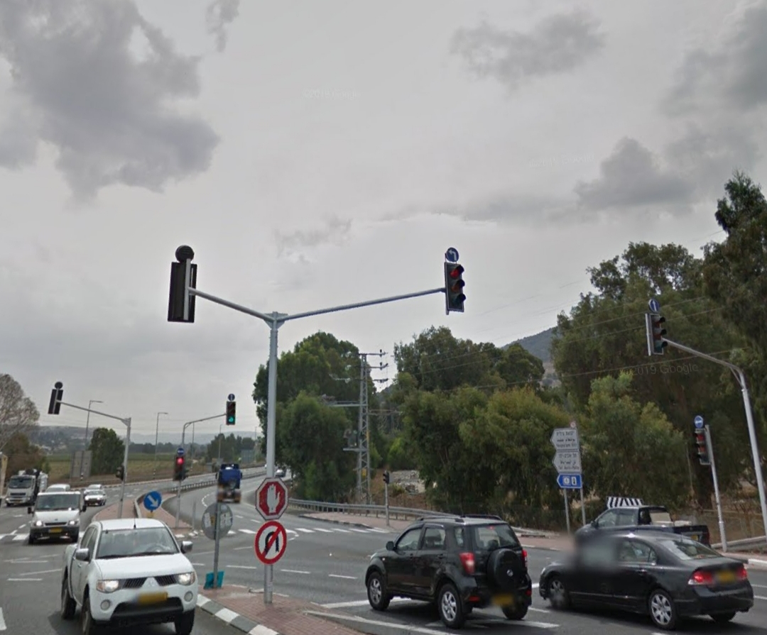 צומת העמקים